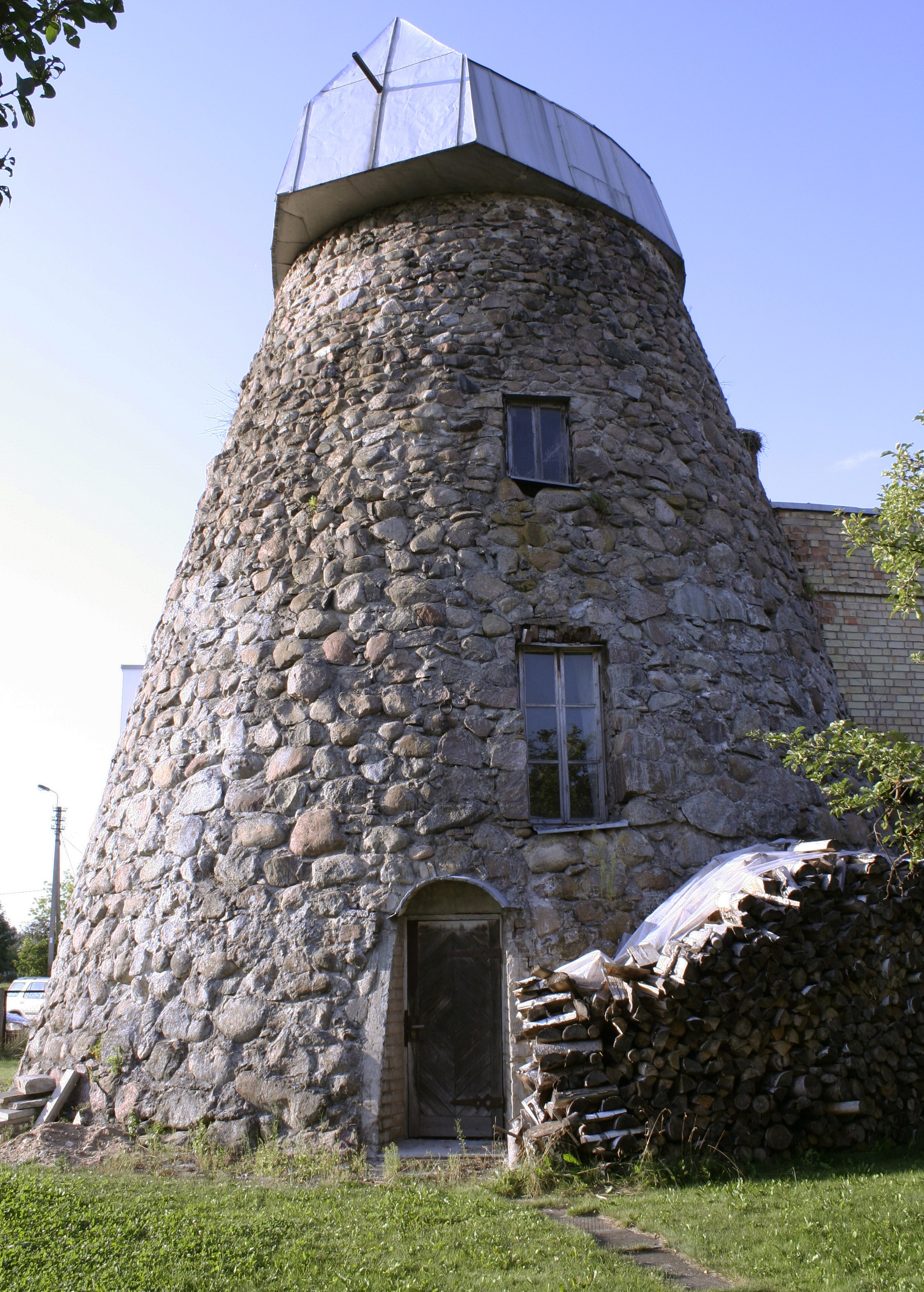 J. Vanago malūnas